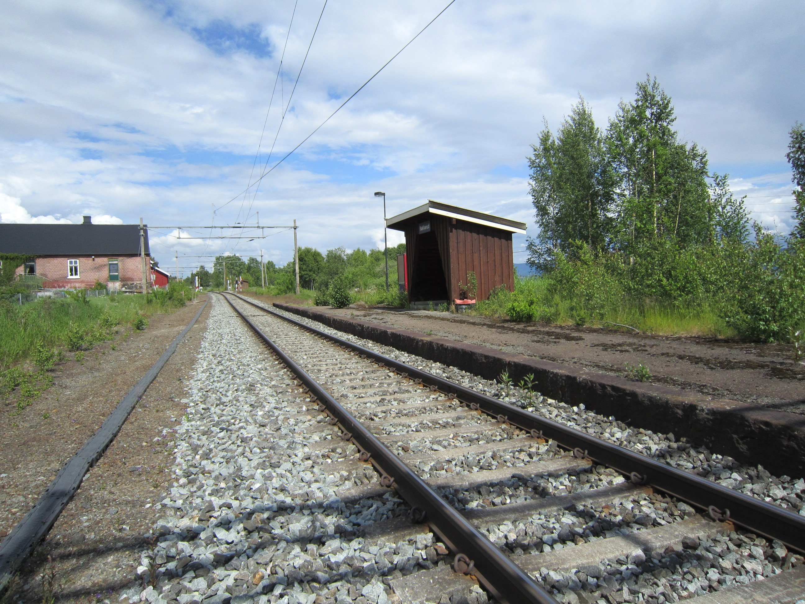 Nakkerud stasjon ved Randsfjordbanen